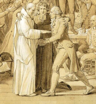 Extrait du tableau du serment du jeu de paume de David.Cadrage sur dom Gerle (clergé régulier), l'abbé Grégoire (clergé séculier) et Rabaut Saint-Étienne, fils du pasteur Paul Rabaut (protestant).